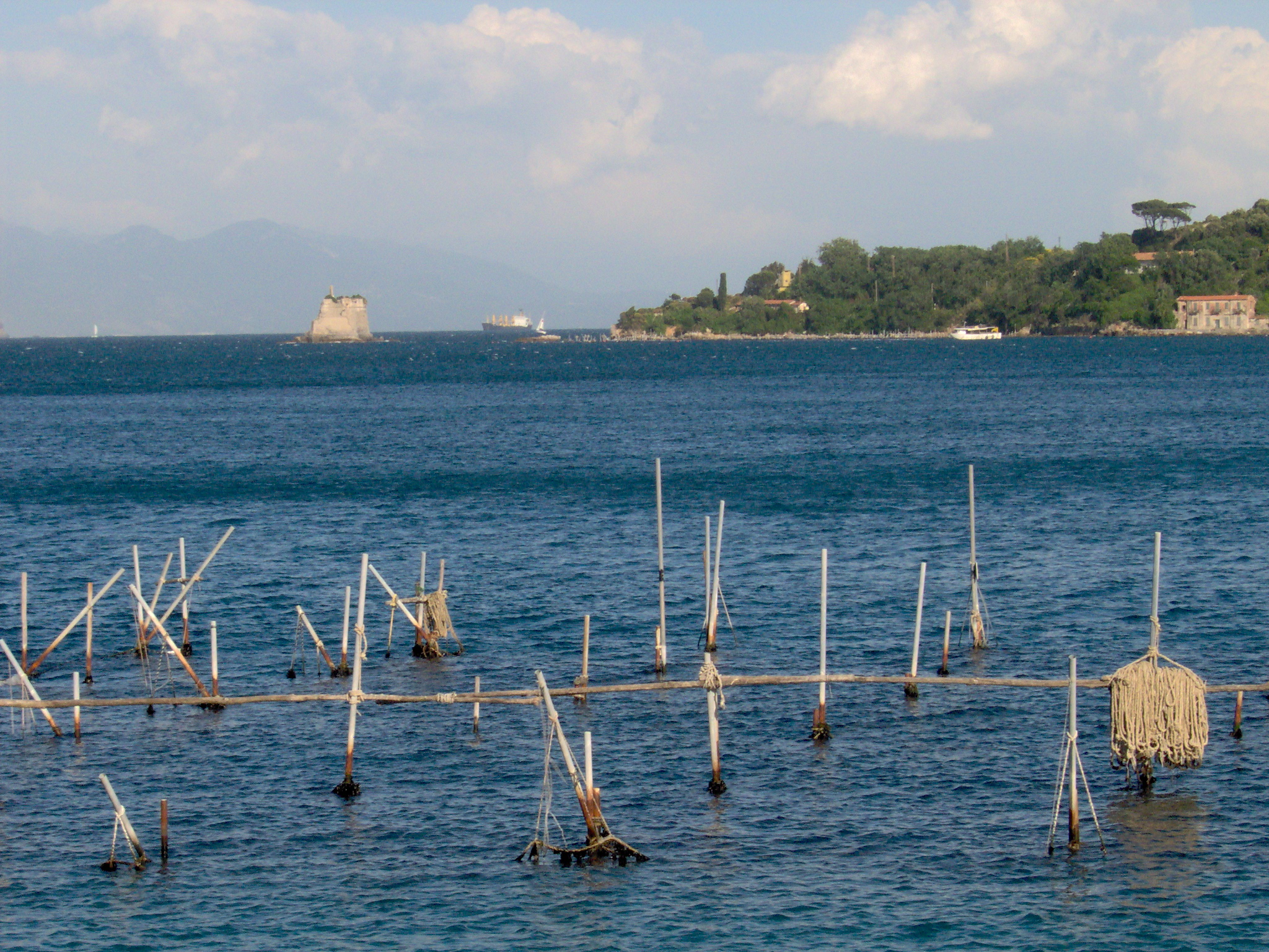 foto provincia spezia